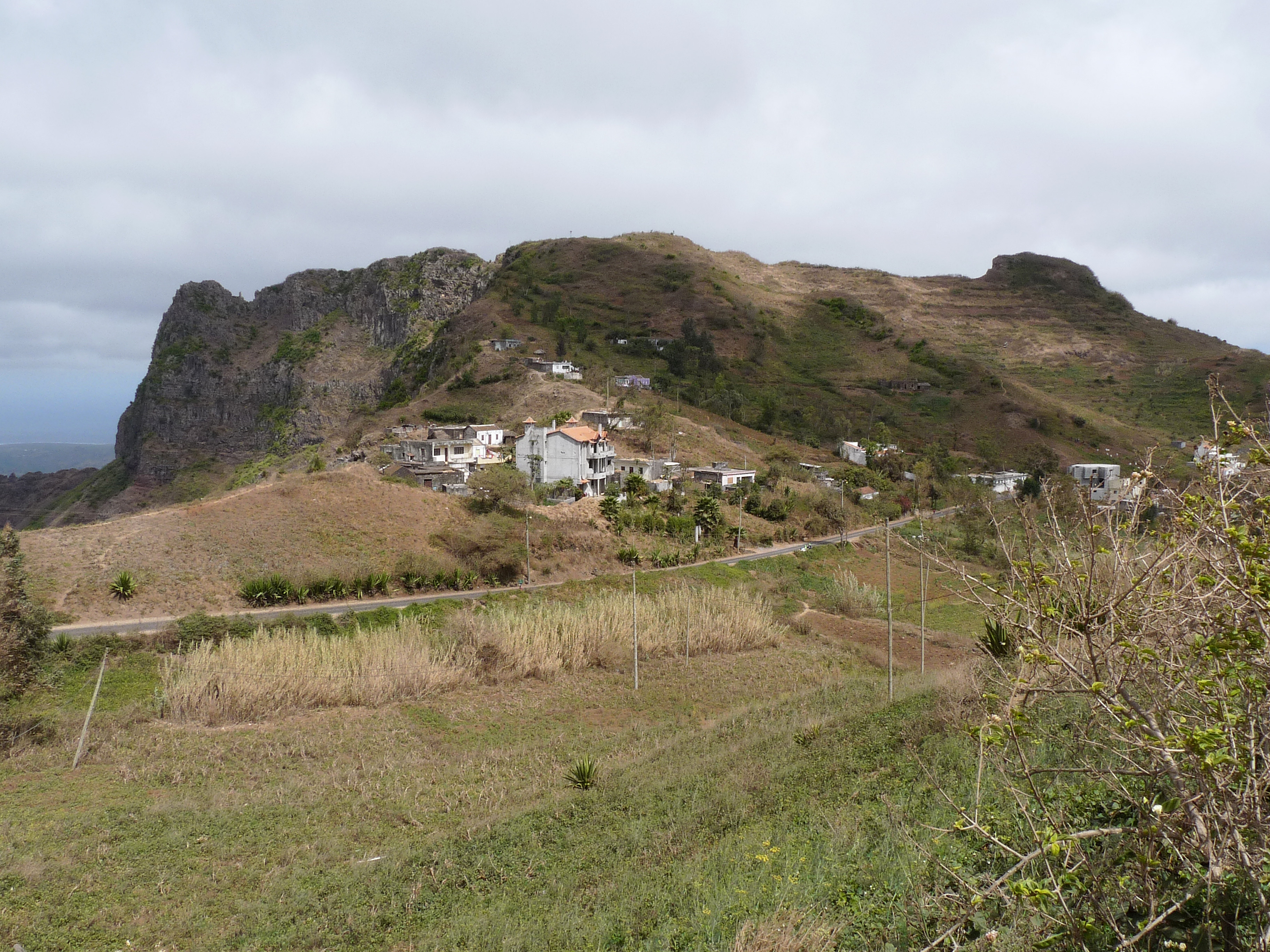 Hameau de Rui Vaz (île de Santiago, Cap-Vert)